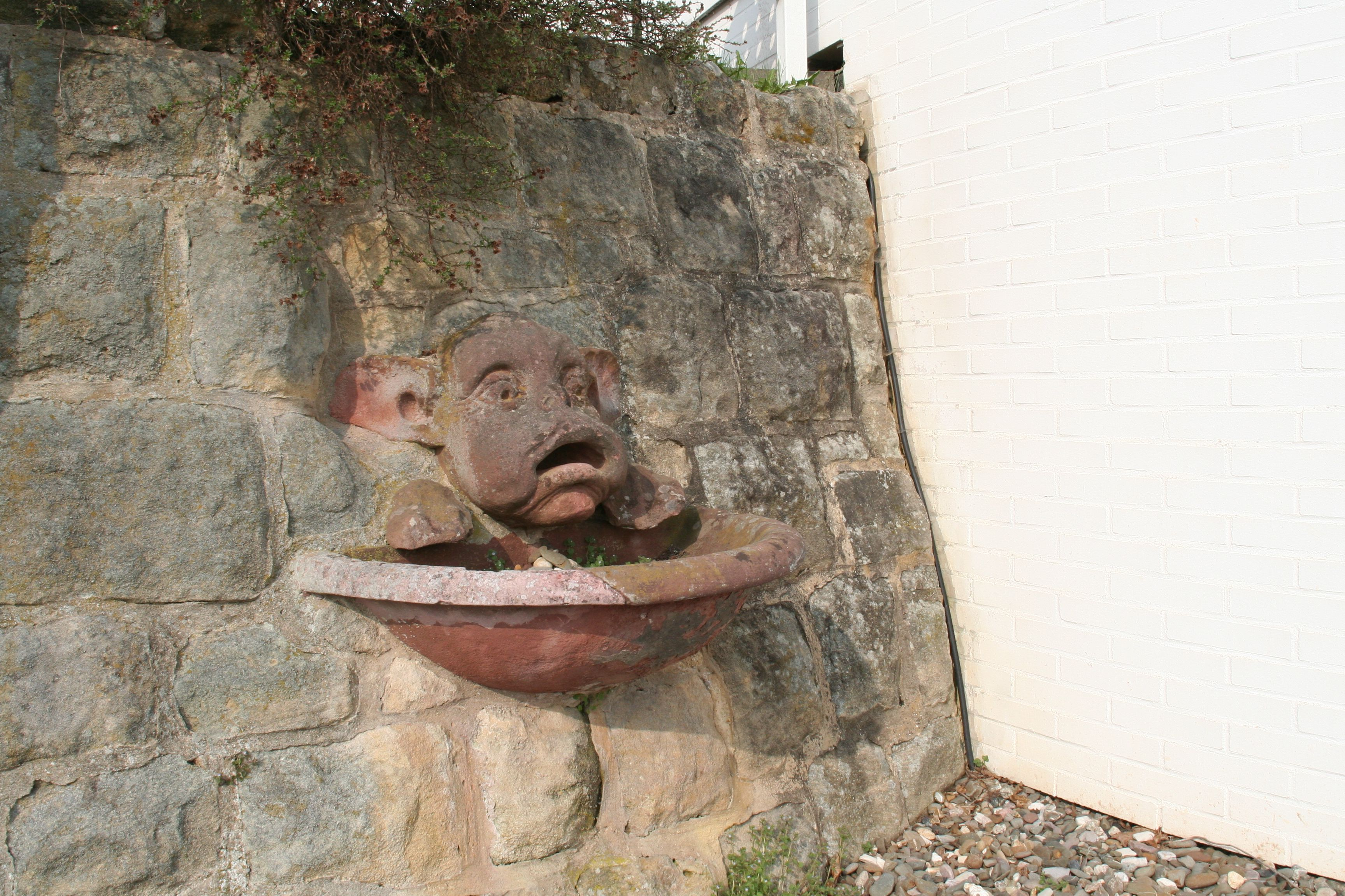 Brunnen zur Fischerei am Kunstvereingebäude in Coburg